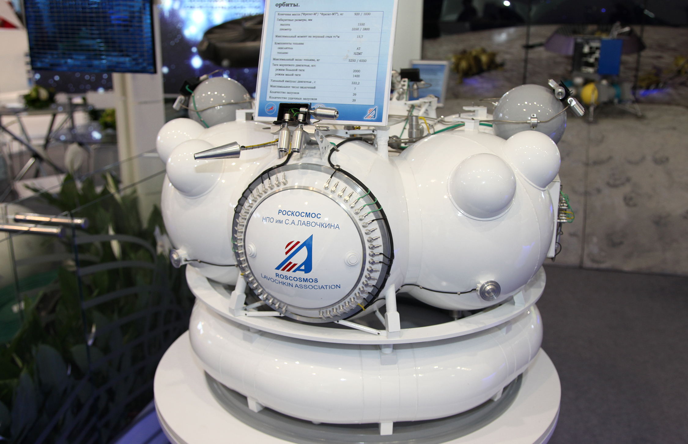 Разгонный блок Фрегат (Fregat rocket stage)